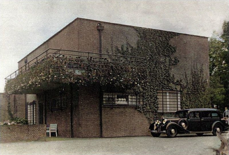 Foto der Villa Wolf in Guben, Haupteingang. Die Kletterpflanzen wurden von Frau Wolf angesetzt um die Form weniger streng zu gestalten.